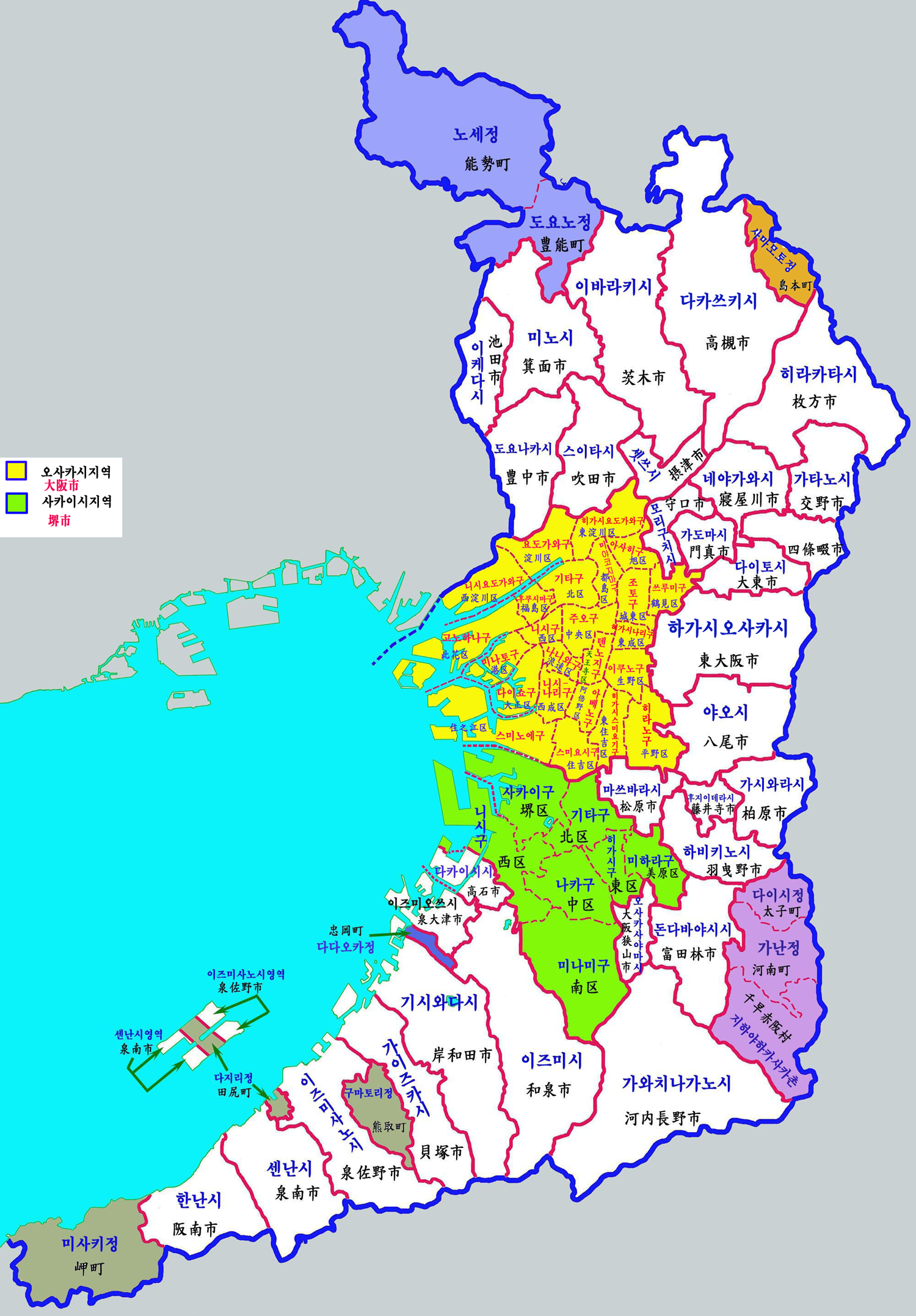 오키키부 행정구역